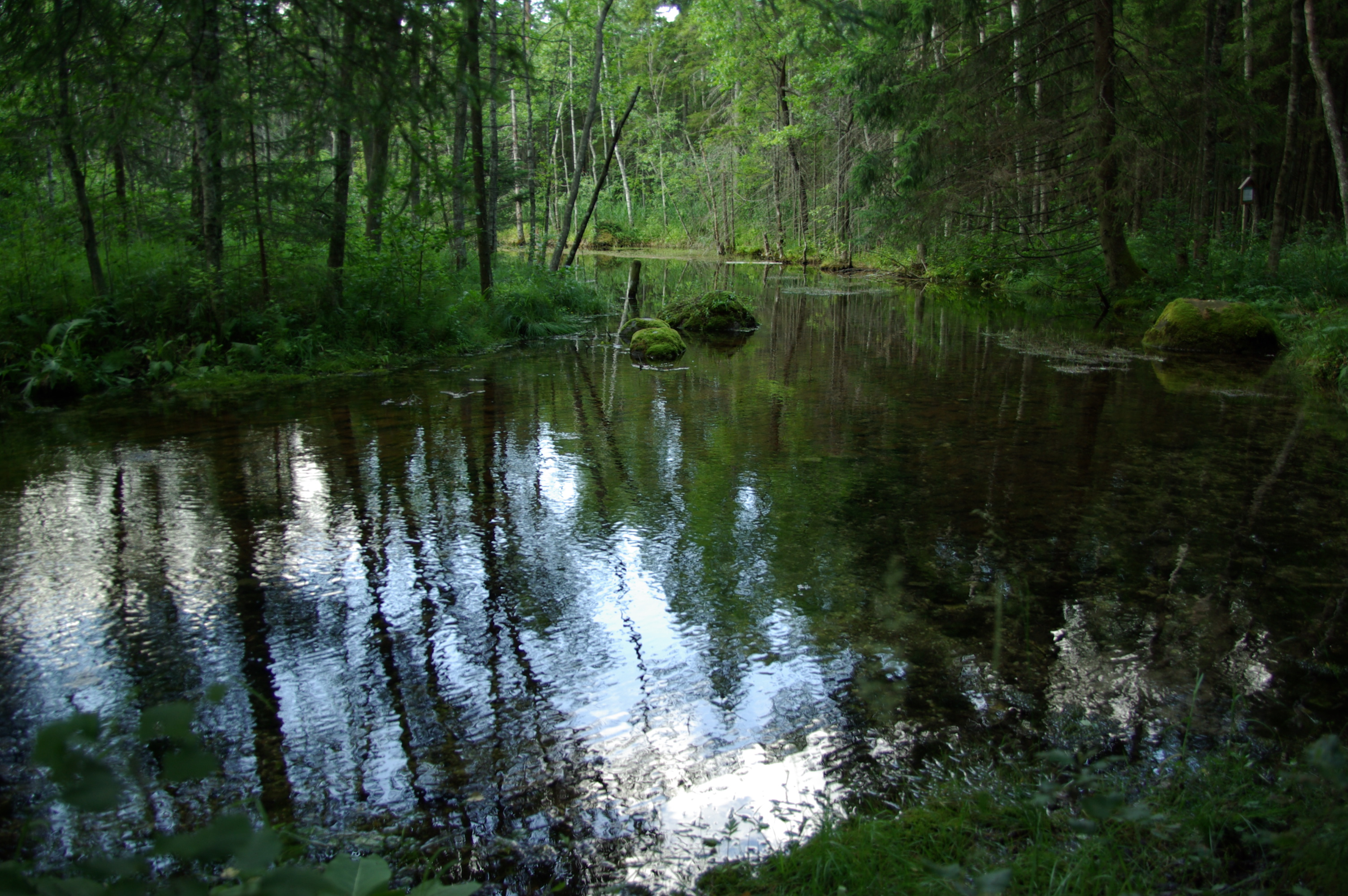 Endla looduskaitseala